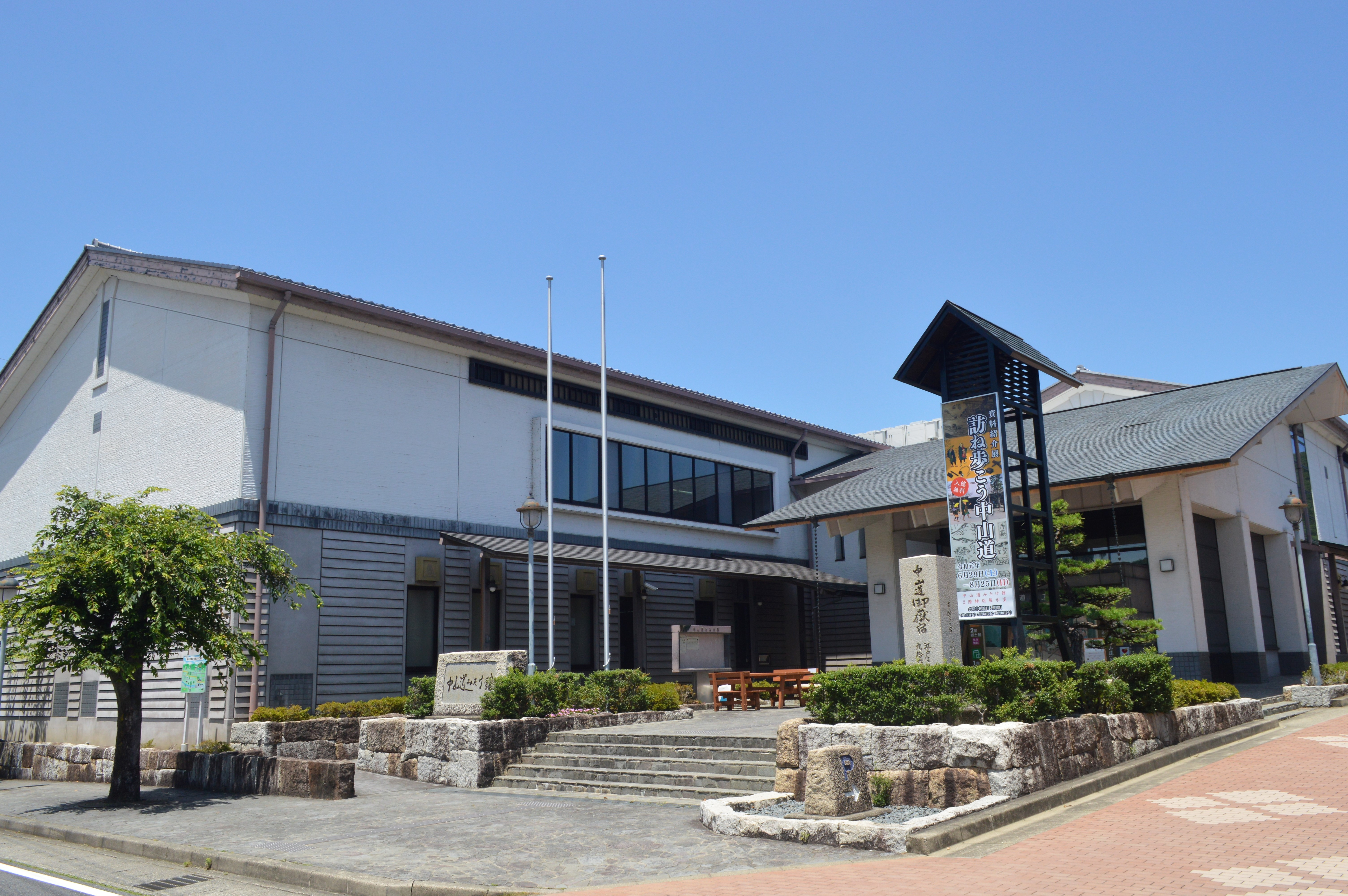 岐阜県可児郡御嵩町にある中山道みたけ館。